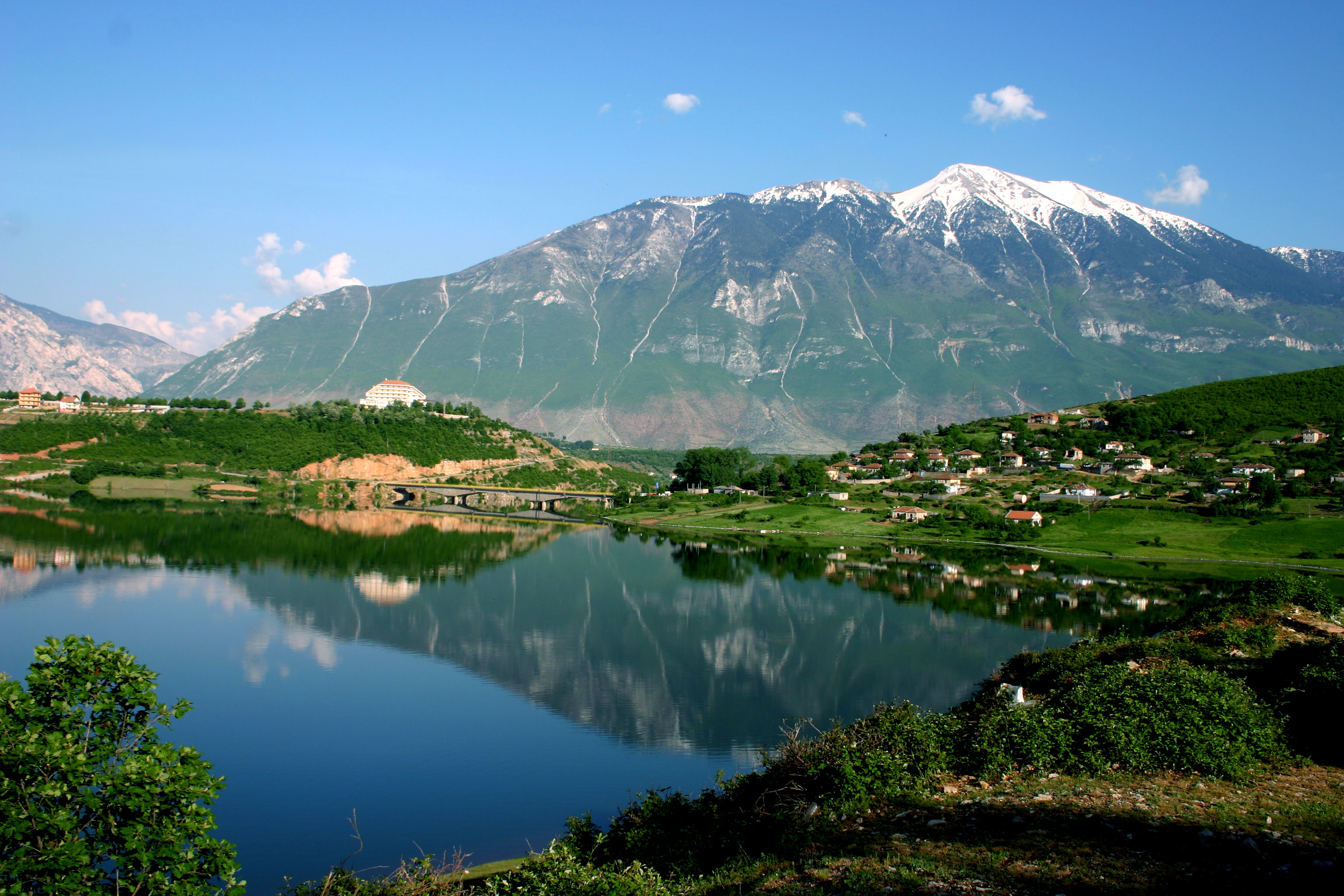 Qyteti i Kukesit sa i vogel fizikisht ,aq i madh gjeografikisht (pasuri natyrore)